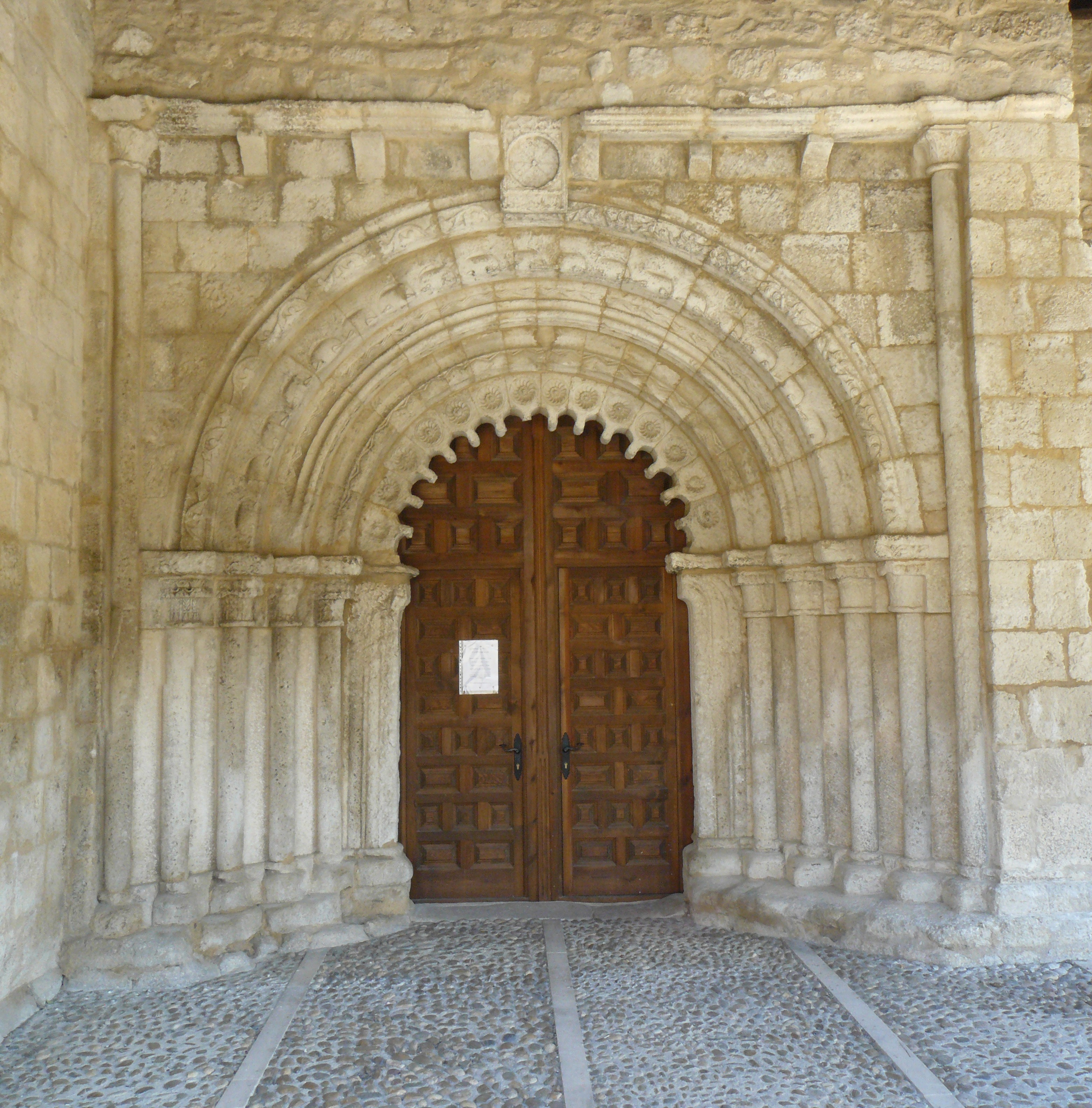 Iglesia de San Bartolomé y capilla de San Galindo, Campisábalos, Guadalajara.